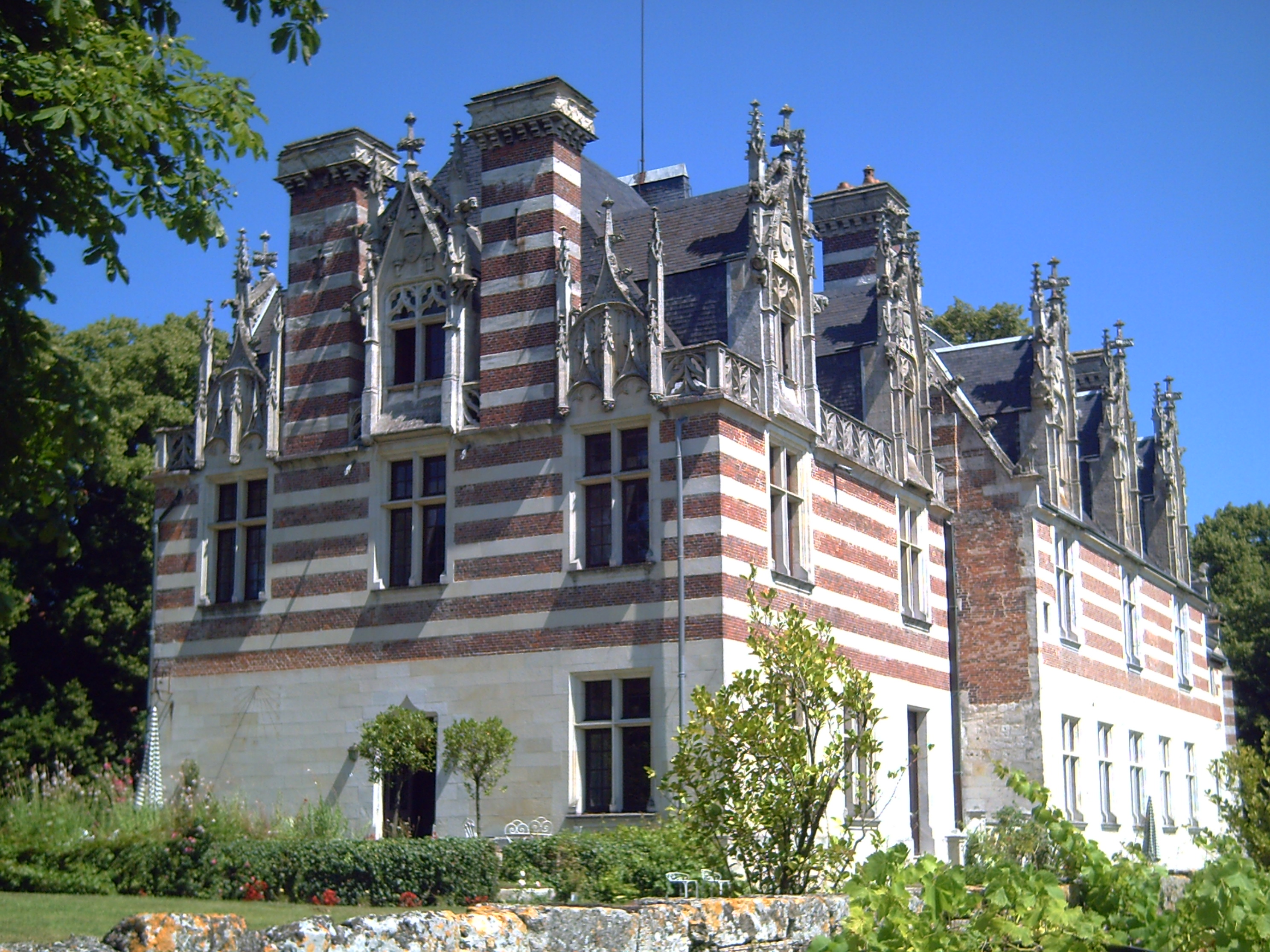 Château d'Etelan Normandie Photo Alain BOUDIER Libre de droits - Mention obligatoire